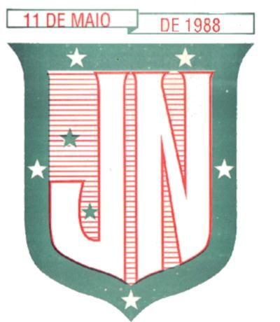 brasão joão neiva